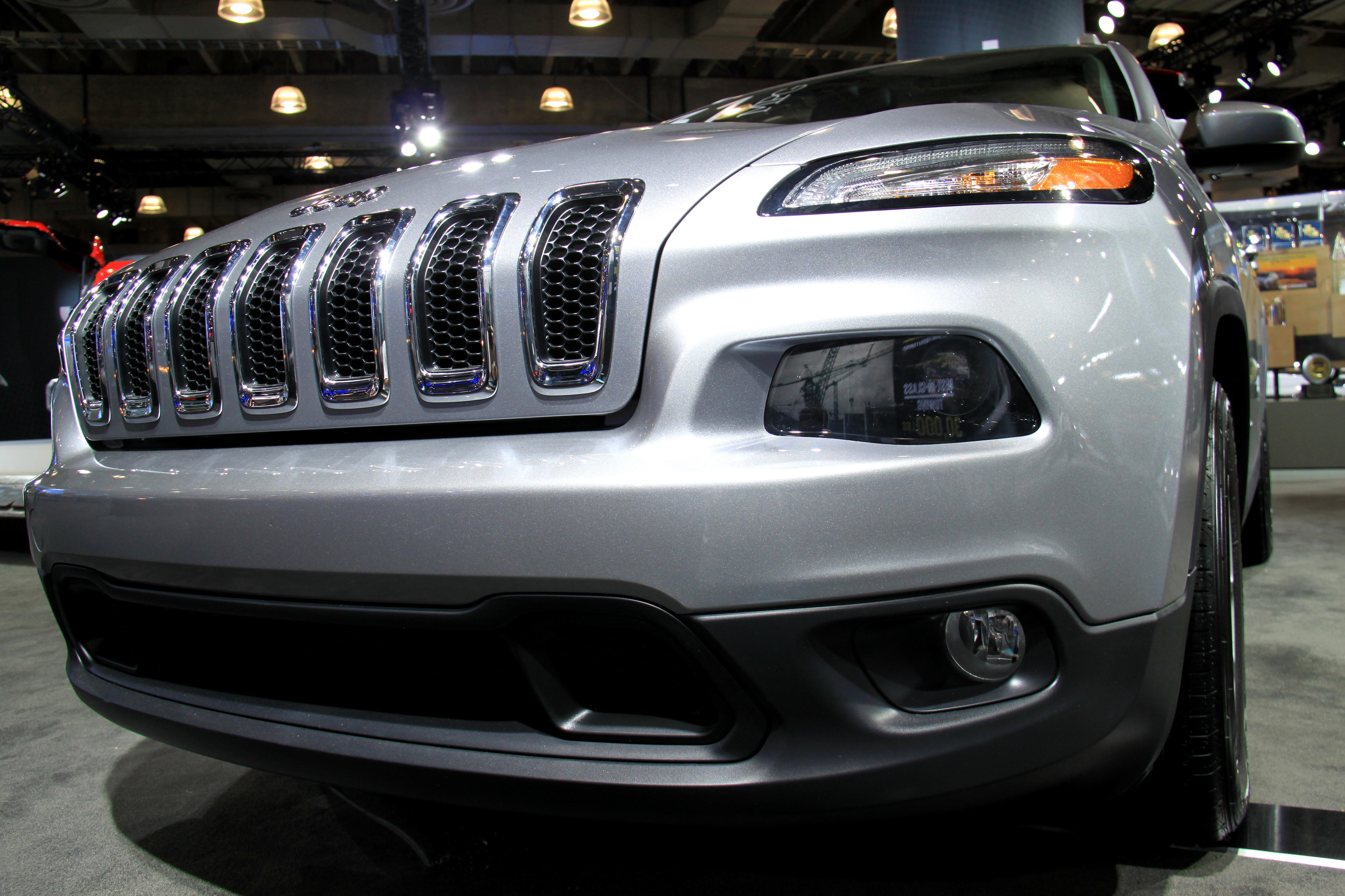 JEEP Cherokee Piattaforma: Alfa Romeo Giulietta esposizione: Salone Internazionale dell'automobile di New York 2014